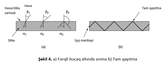 Fərqli bucaq altında sınma Tam qayıtma